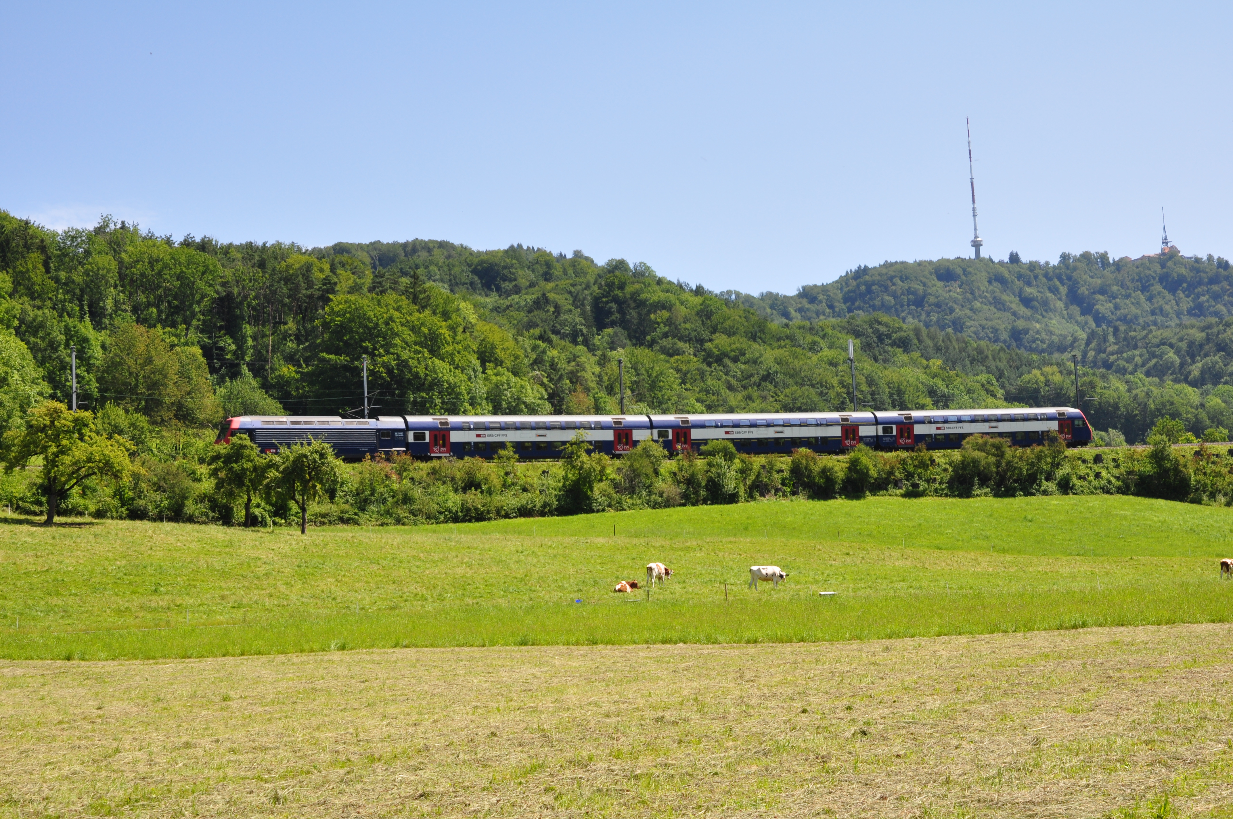 Sicht von Landikon Richtung Hausberg von Zürich (Uetliberg)